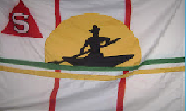 Salto da Divisa-MG